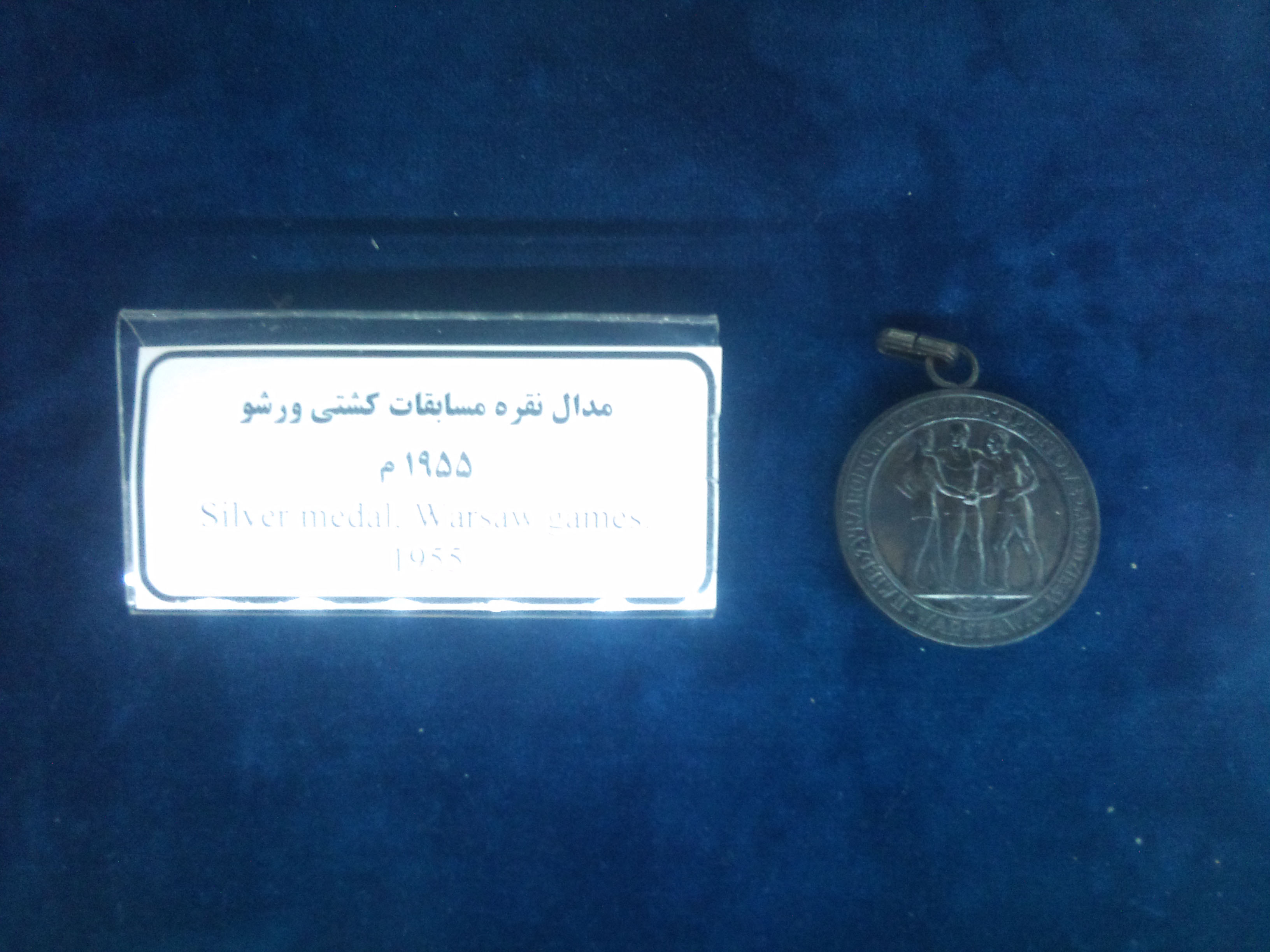 Mashhad museum